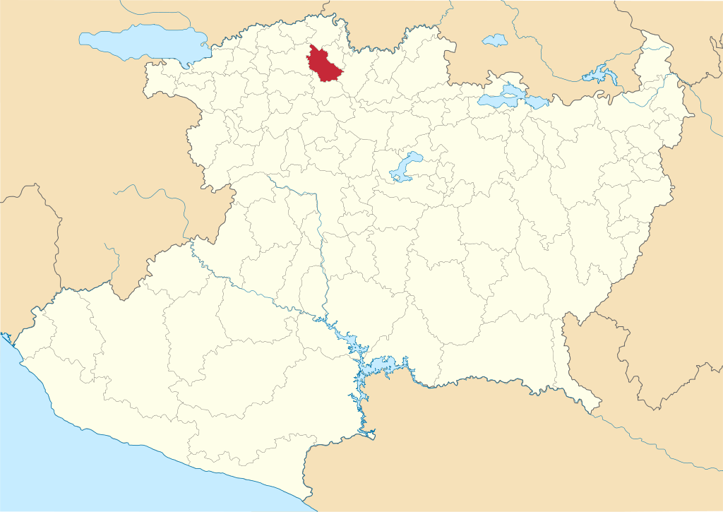 Ubicación del municipio de Churintzio.